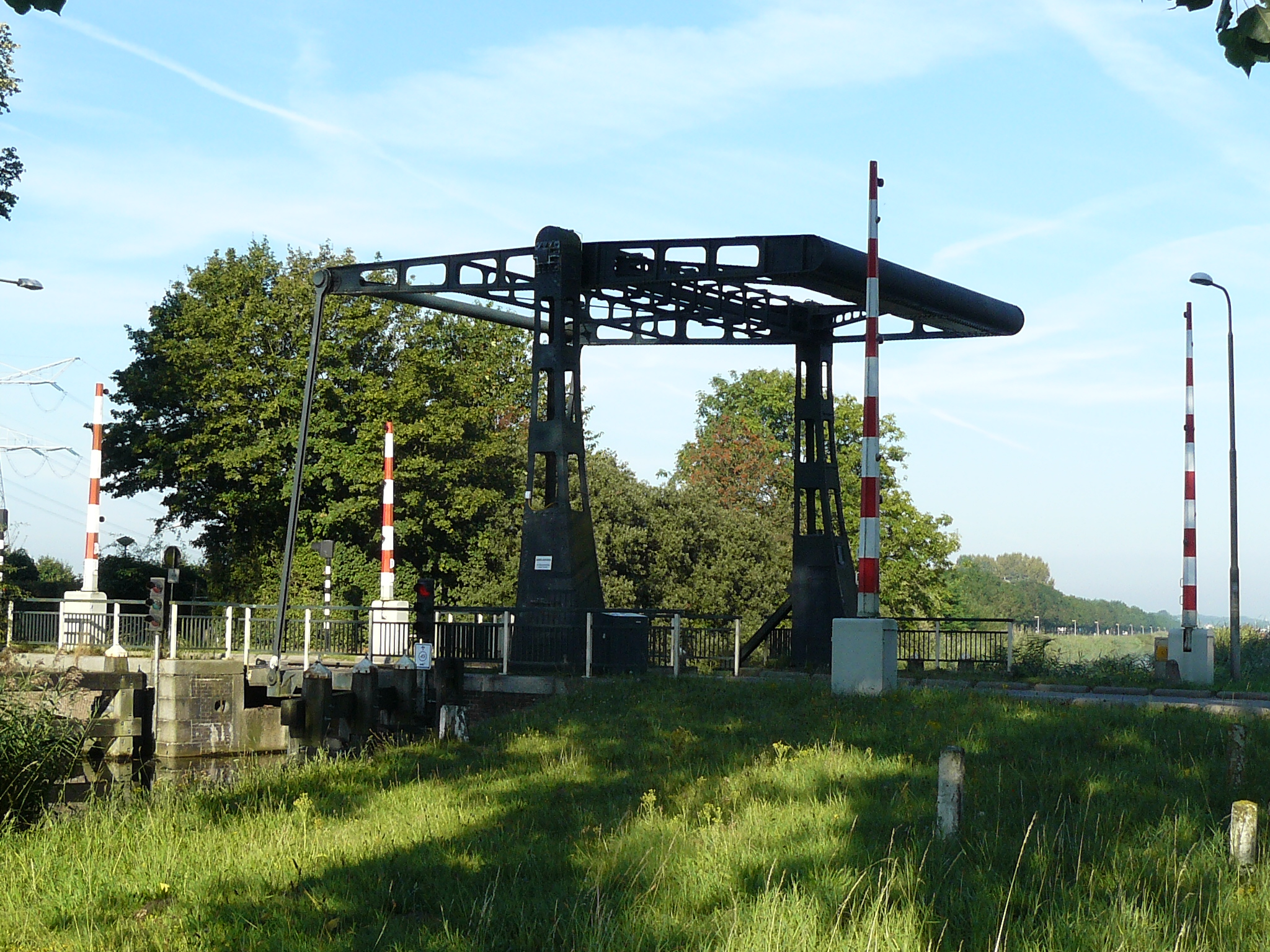 De Hakkelaarsbrug nabij Muiderberg, gefotografeerd in de richting van Muiden.